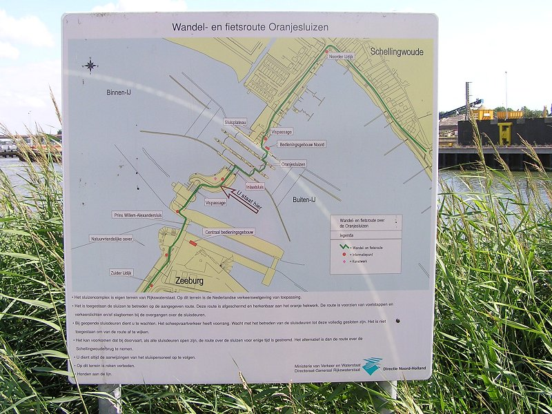 Plattegrond Oranjesluizen. Foto juli 2005.